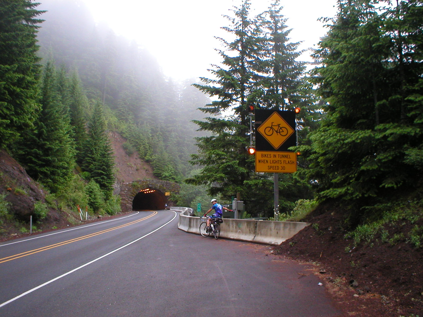 Sign says: BIKES IN TUNNEL WHEN LIGHTS FLASH SPEED 30